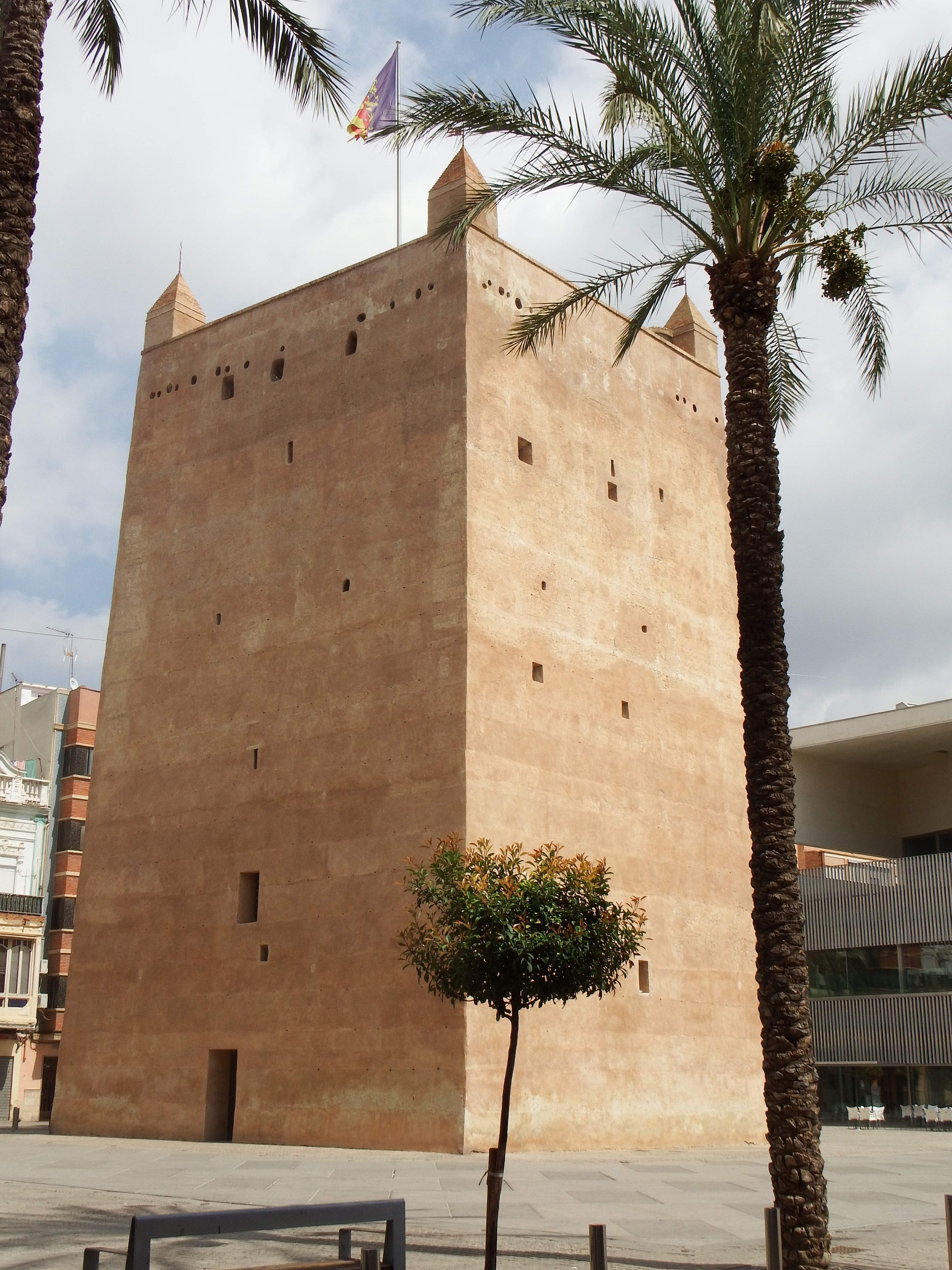 Torre árabe de Torrente